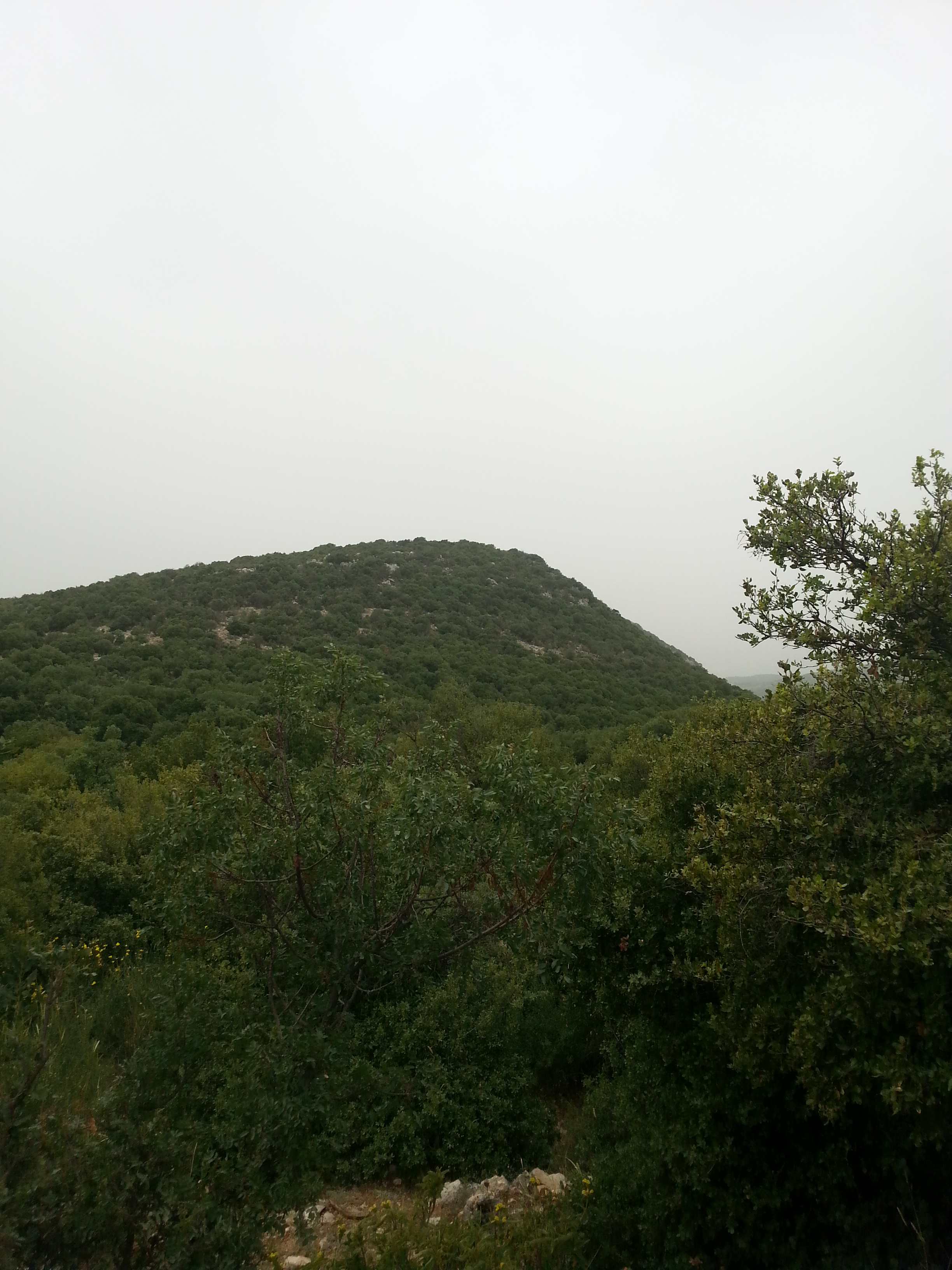 הר סנאים